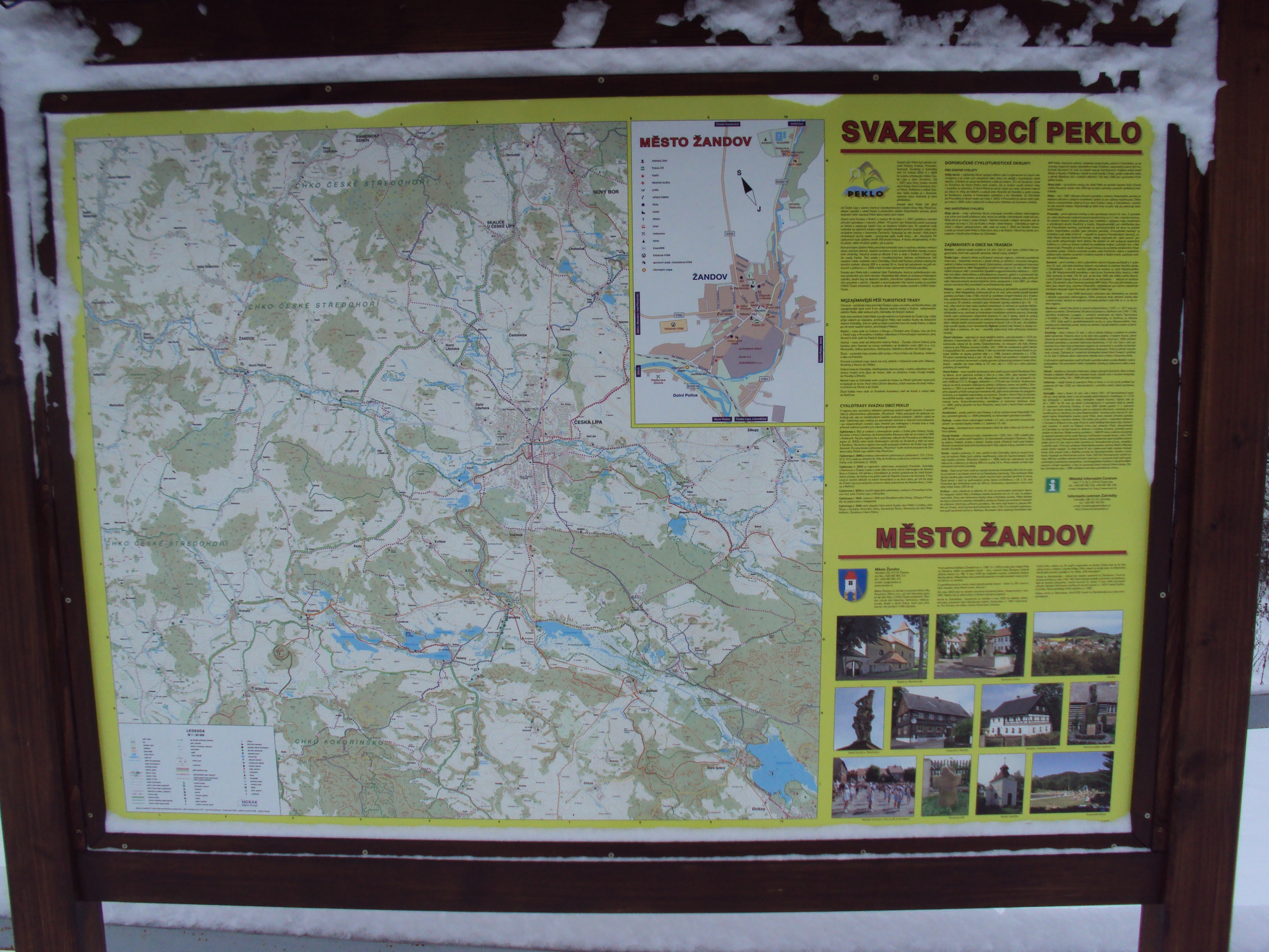 Infopanel Sdružení Peklo v Žandově u vlakové zastávky, zblízka